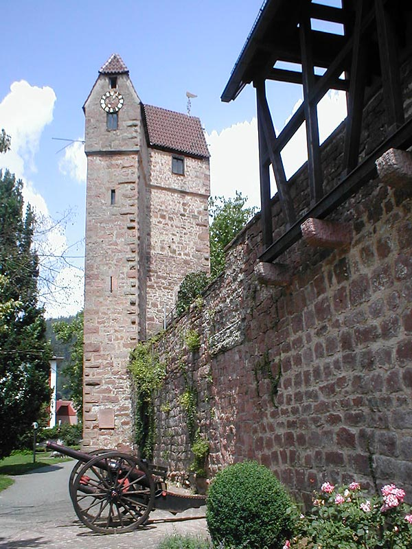 Pulverturm in Eberbach/Neckar // Pulverturm